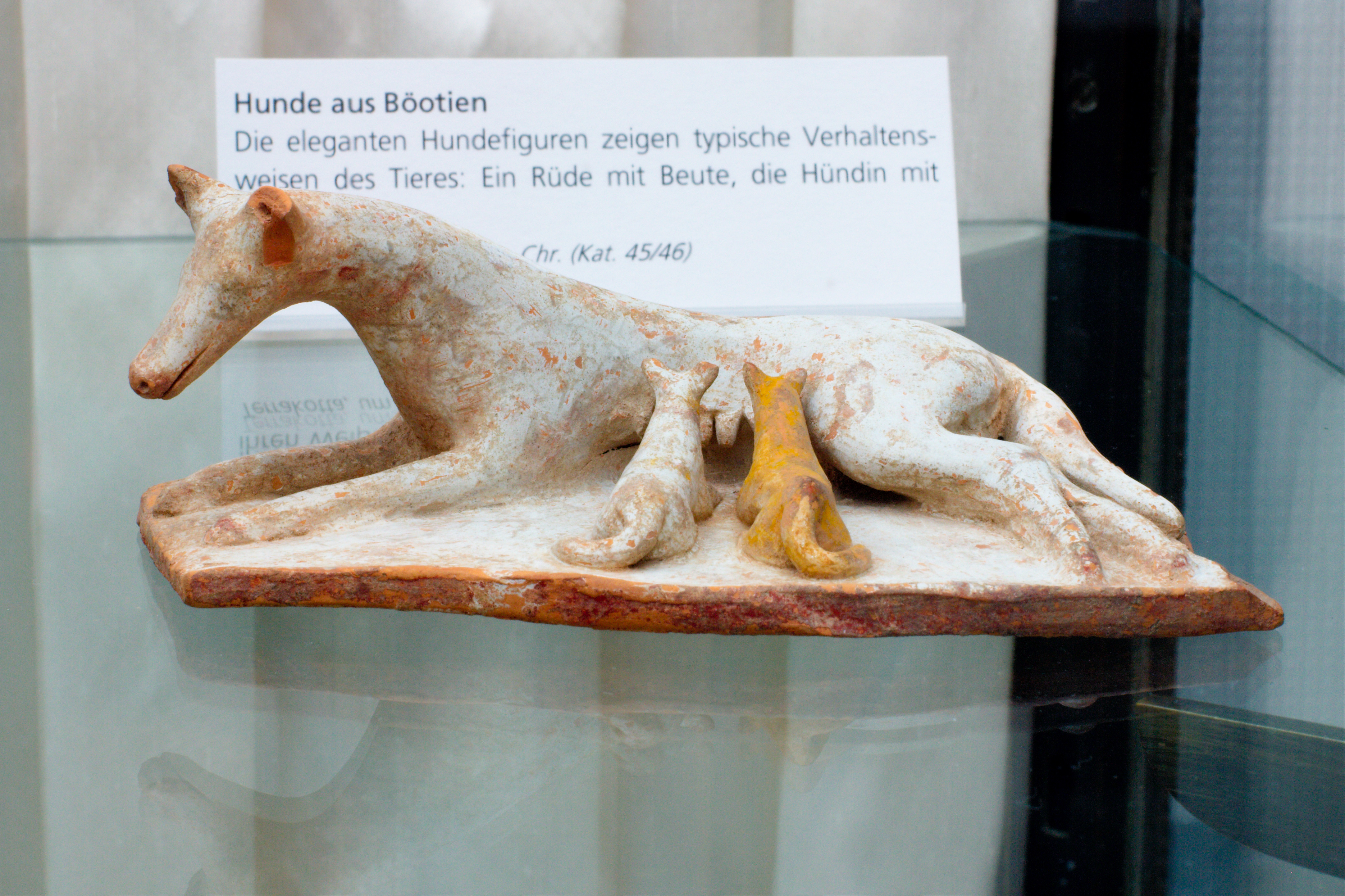 Hund mit Hase.